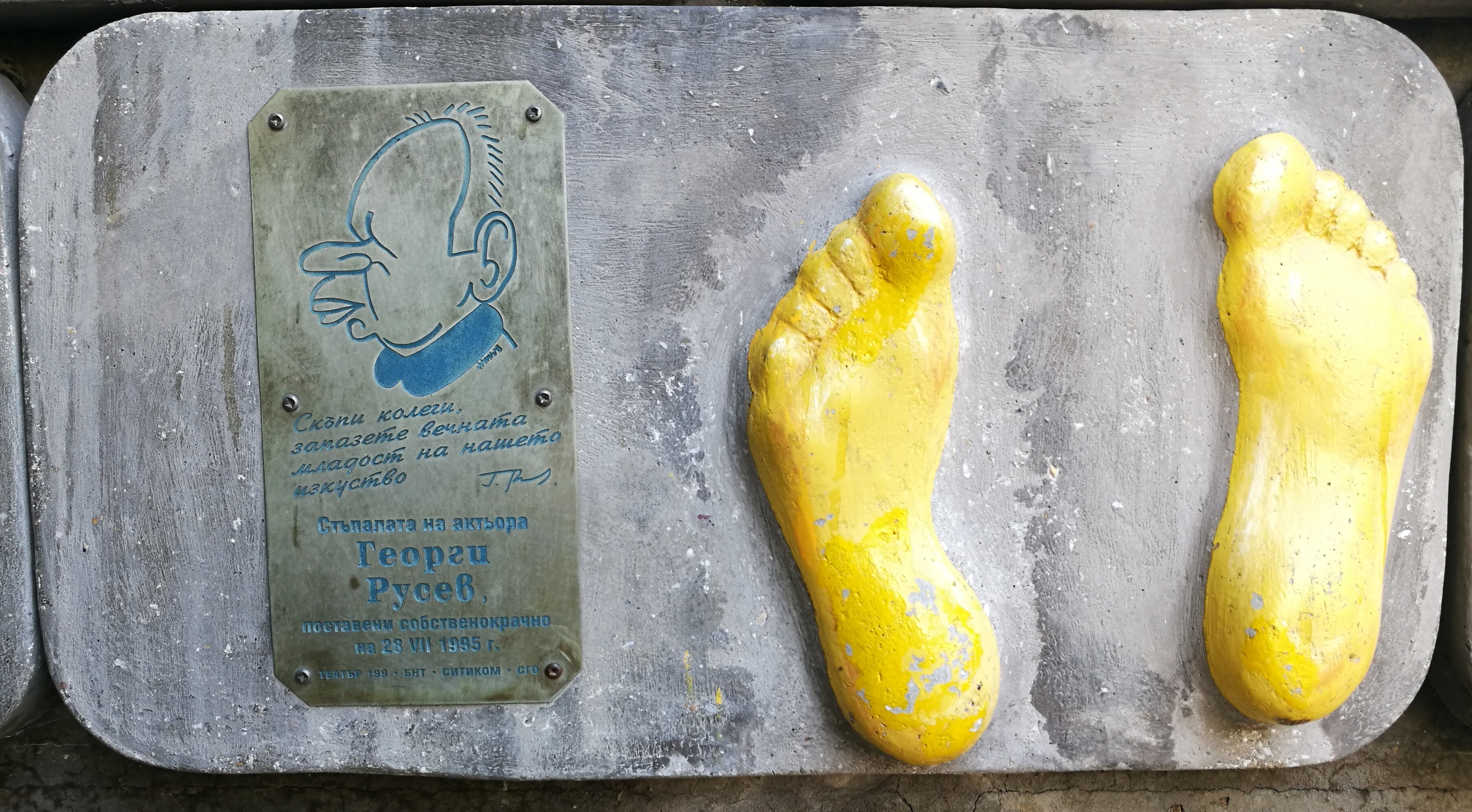 Стената на славата пред Театър 199 - пано с отпечатъци, послание и шарж на Георги Русев.